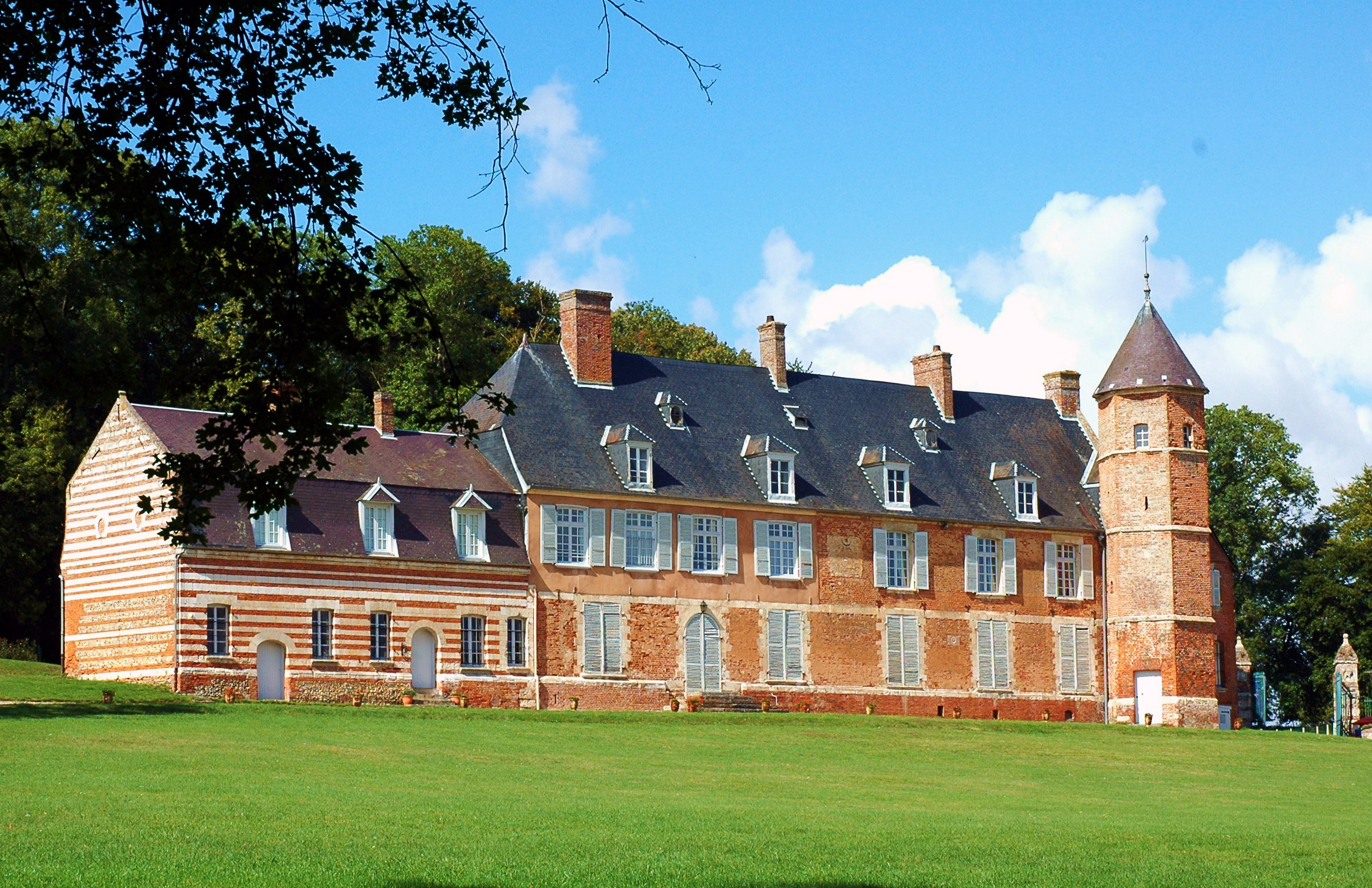 Avesnes-Chaussoy (Somme, France). Le château.